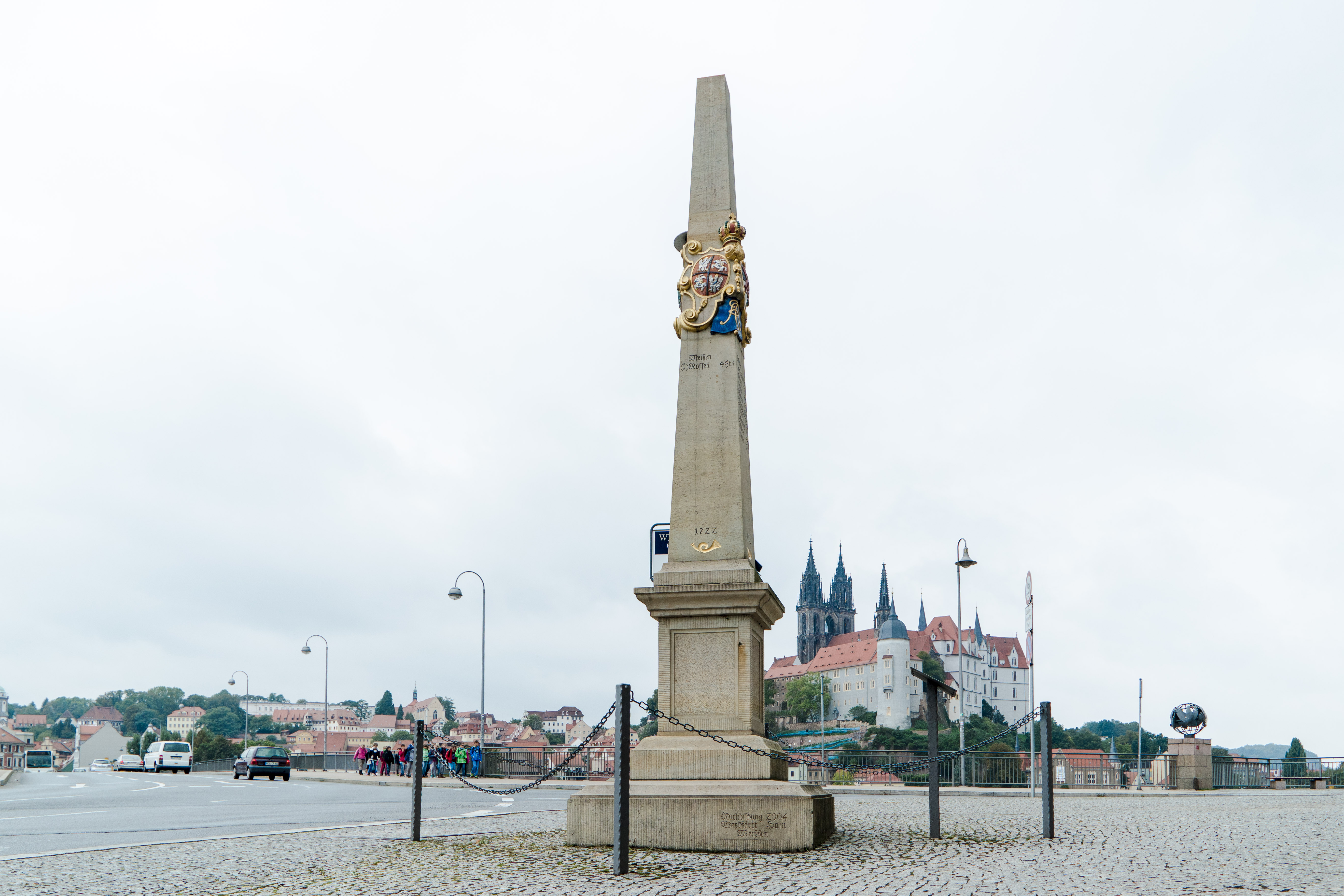 Kursächsische Postmeilensäule-Distanzsäule in Meißen